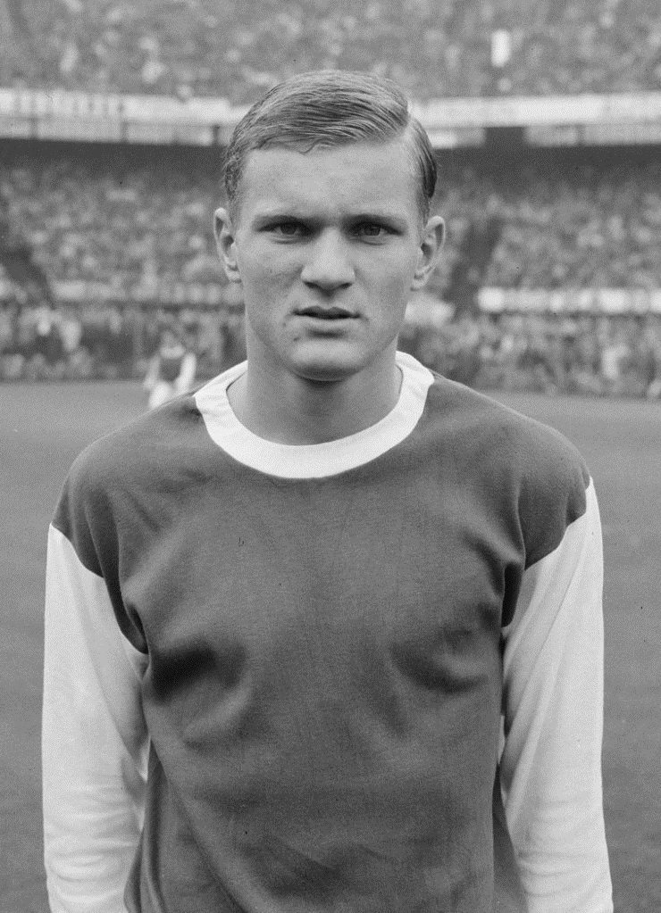 Hans Venneker